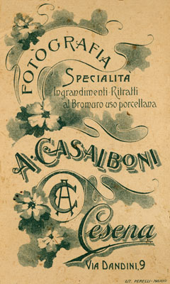 Locandina pubblicitaria di Augusto Casalboni, foto di Augusto Casalboni, morto nel 1929.